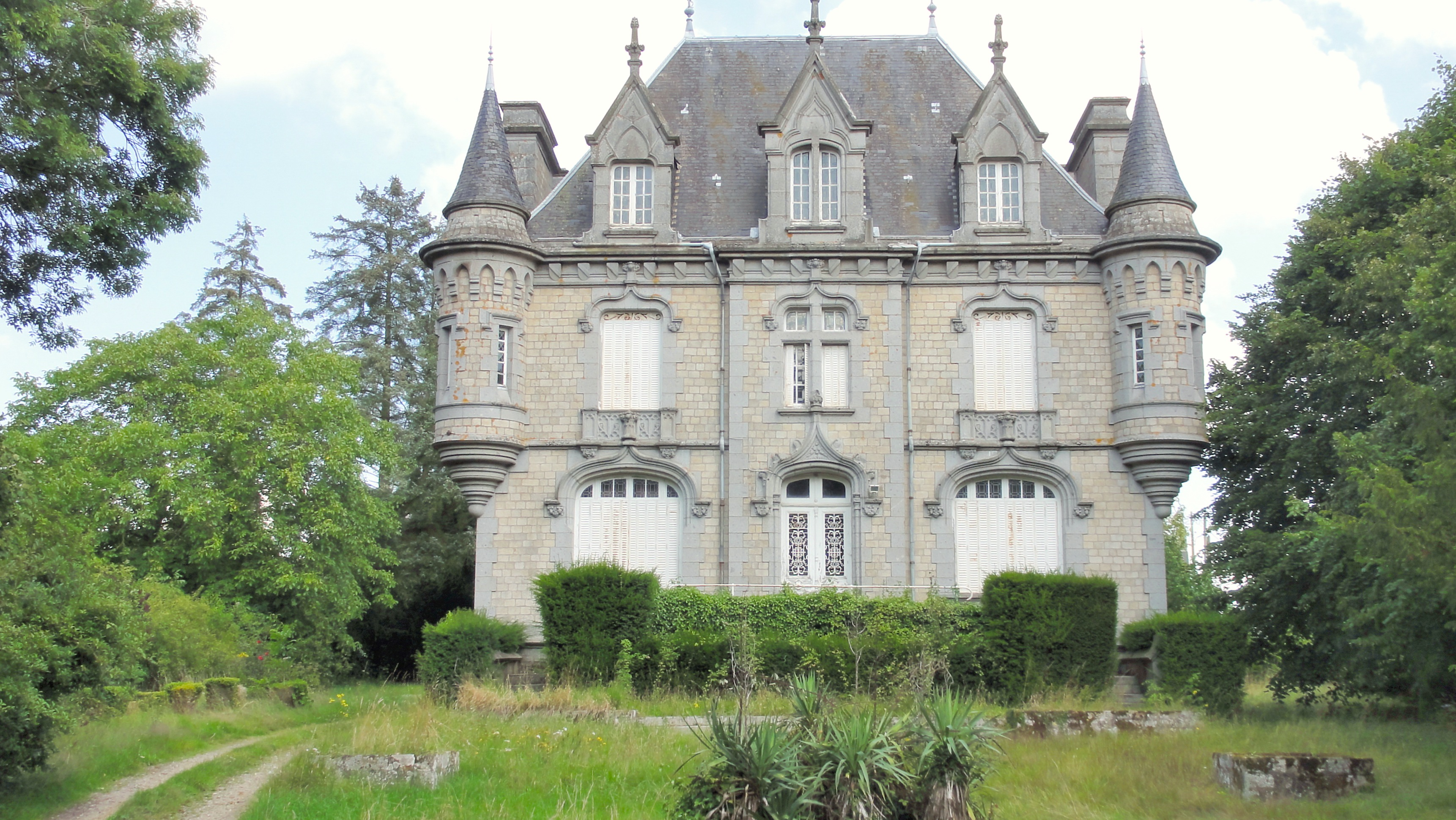 Chateau de Segrie L orne